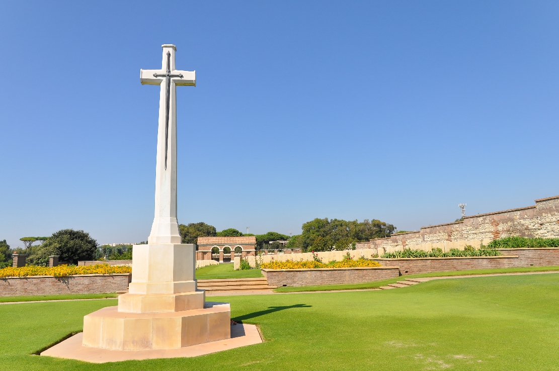 Anzio Britischer Soldatenfriedhof 2012